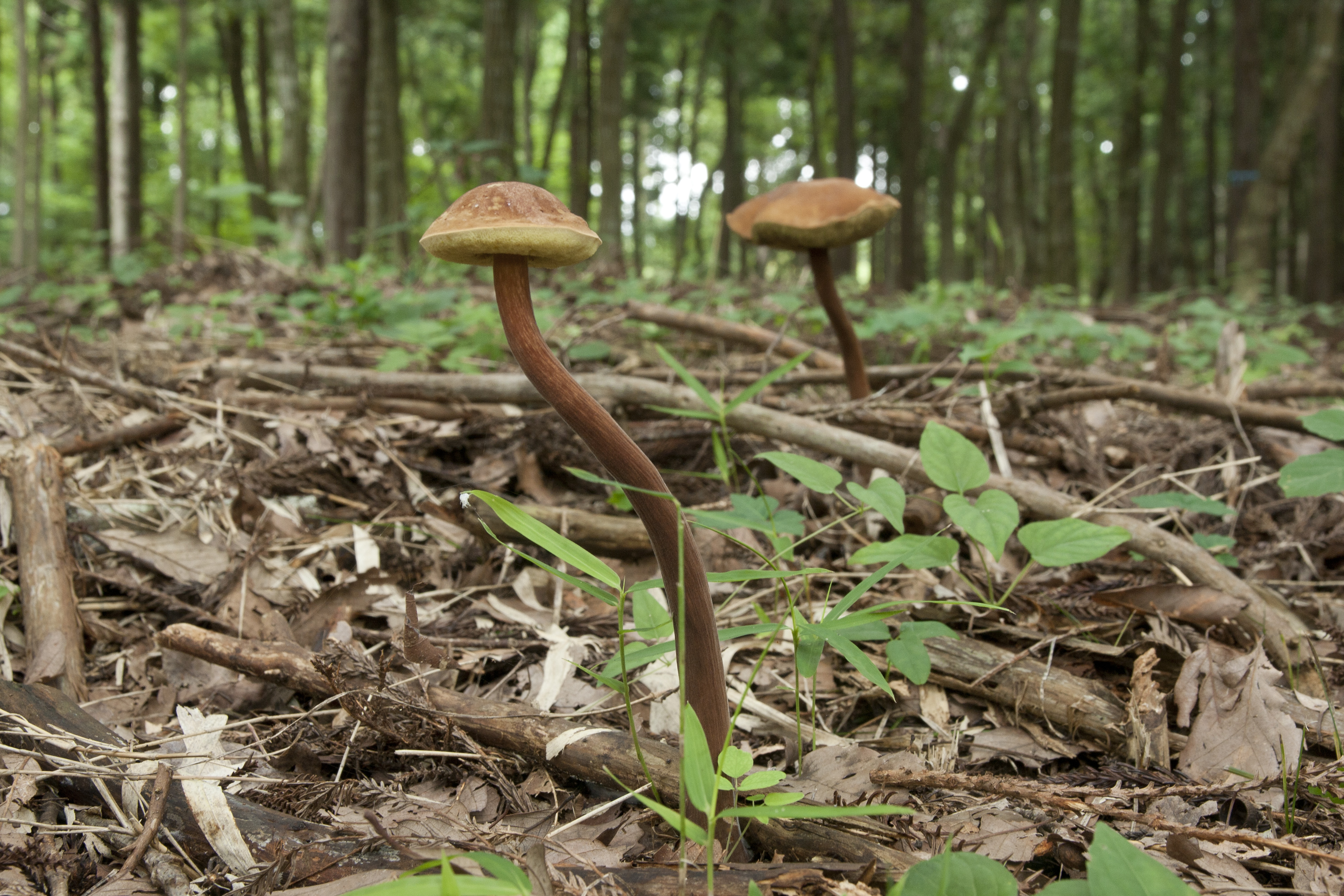 アシナガイグチ (学名:Boletellus elatus)